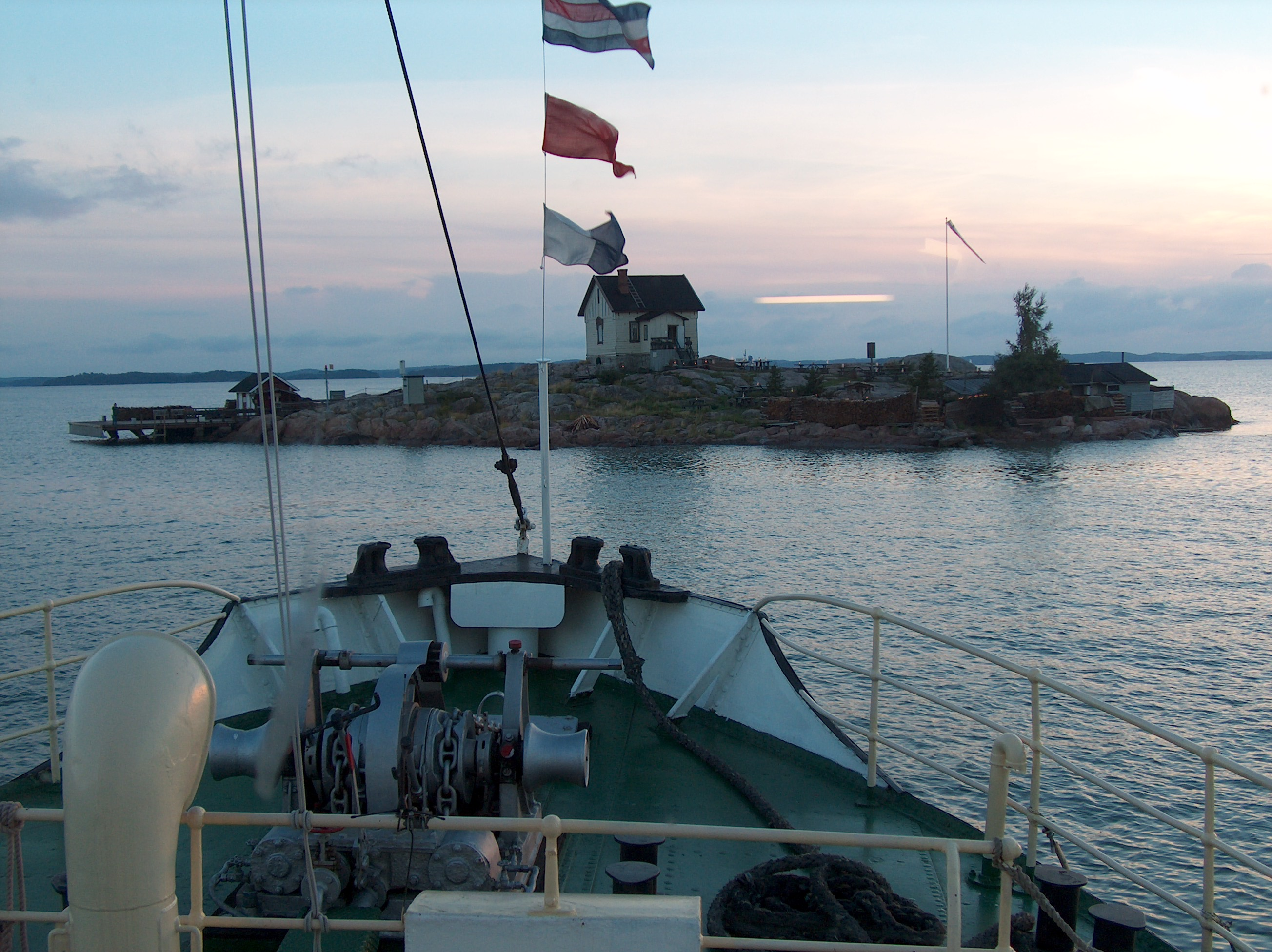 Loistokari Ruissalon edustalla.